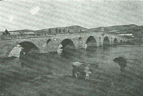 Емир Ќучук Султанов мост - Штип